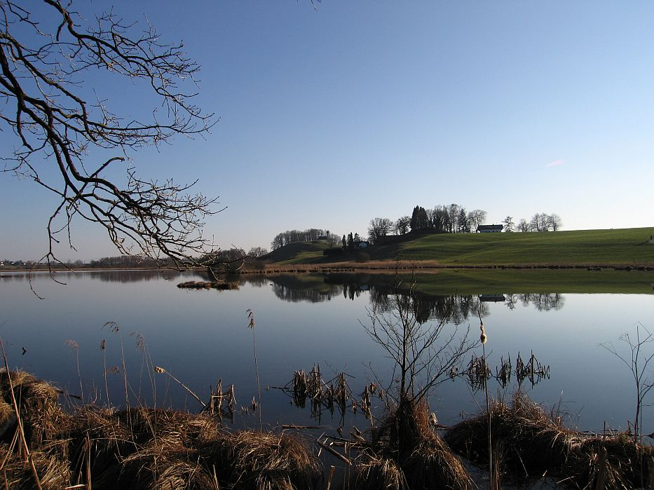 Egglburger See, Aufnahme von der Nordseite aus, fotografiert am 18. Februar 2007